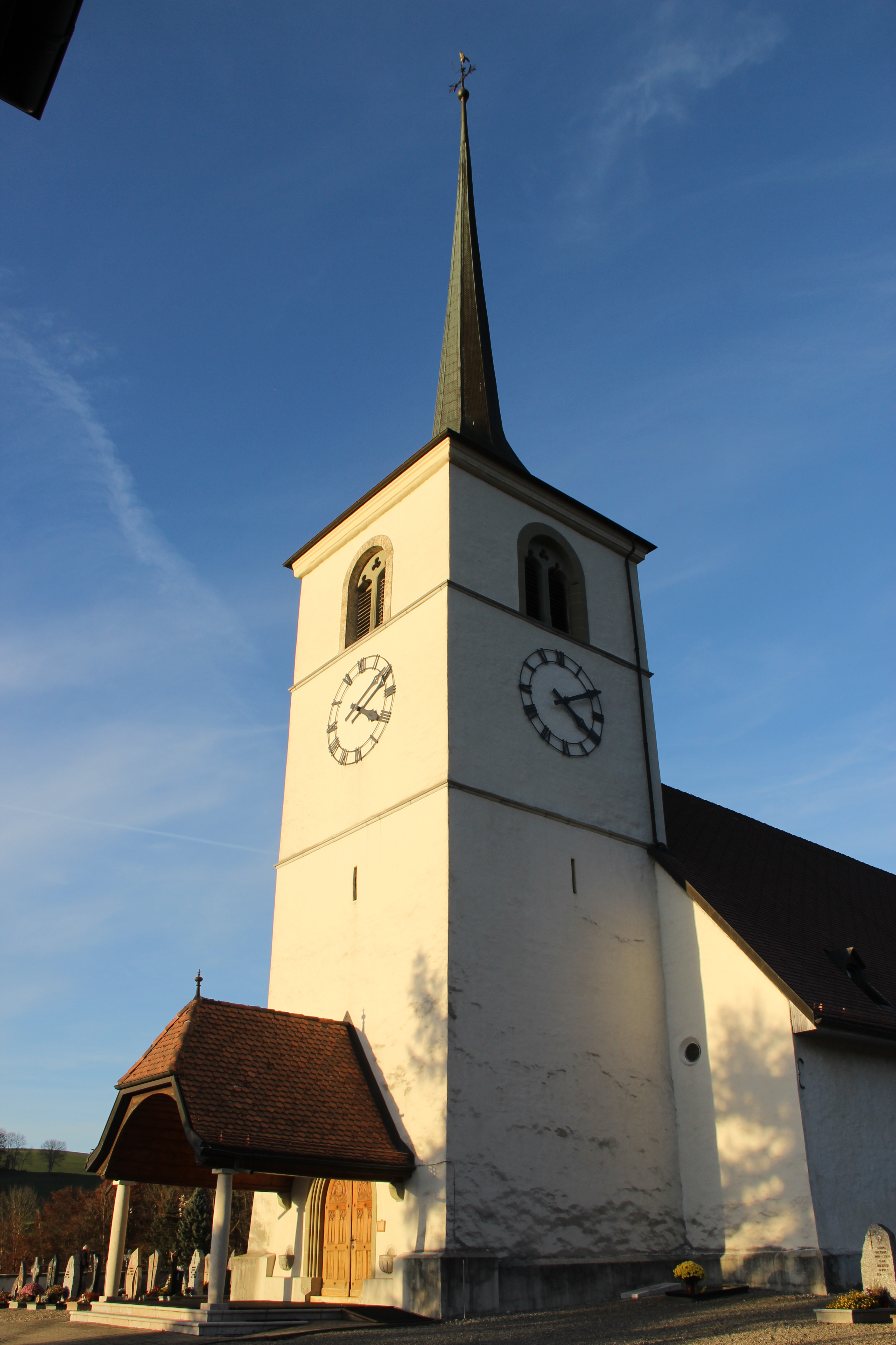 Kirche Notre-Dame de l’Assomption